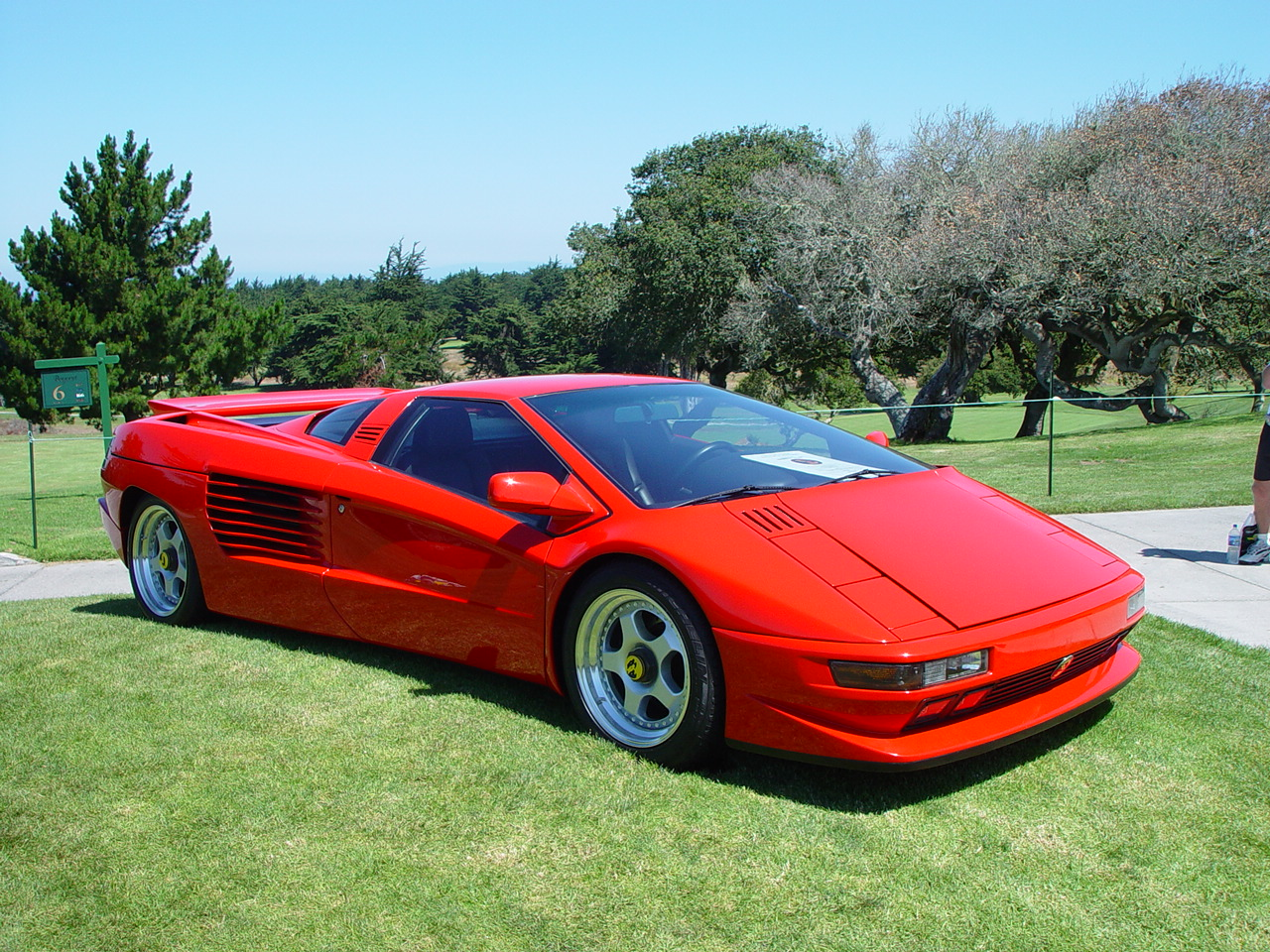 DSC09539 Cizeta-Moroder V16T at 2003 Concorso Italiano, Seaside, CA.